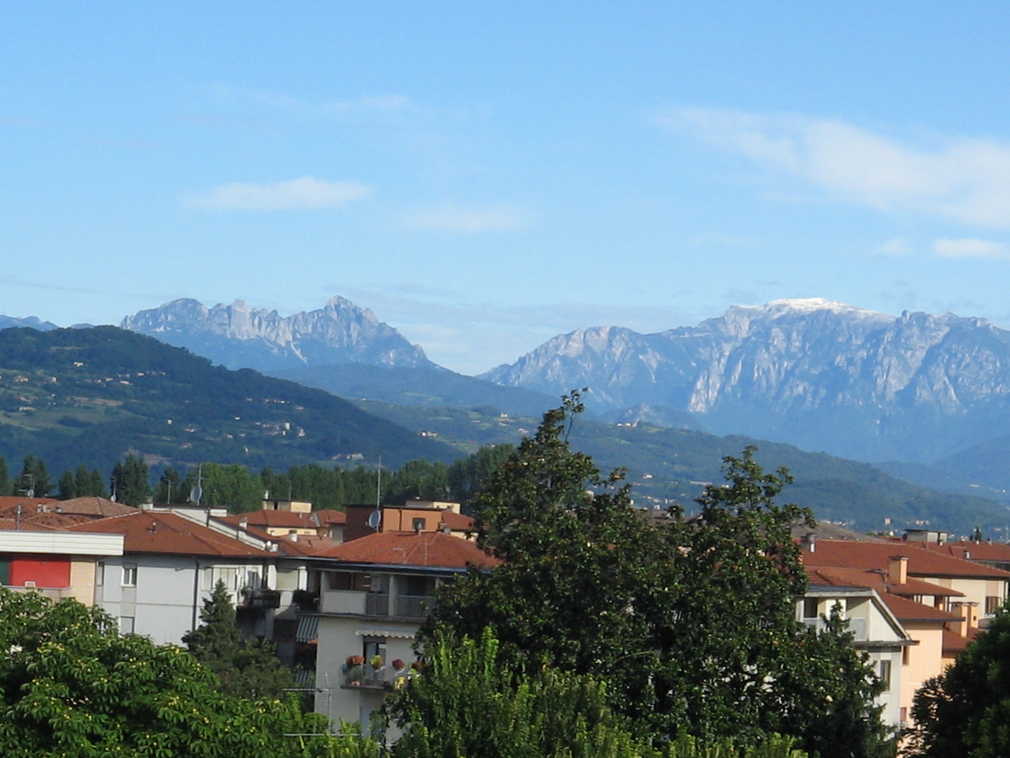 Template:Vec.